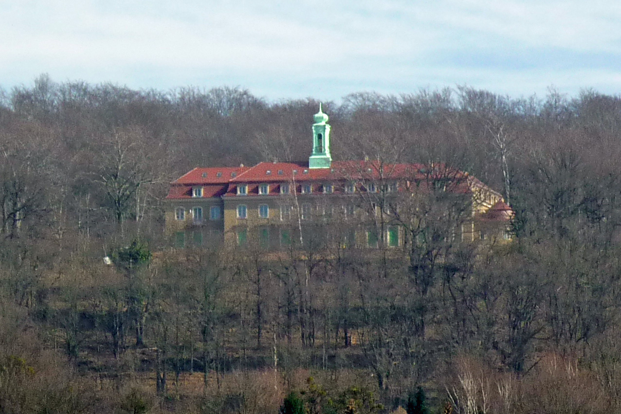 Schloss Wachwitz in Dresden